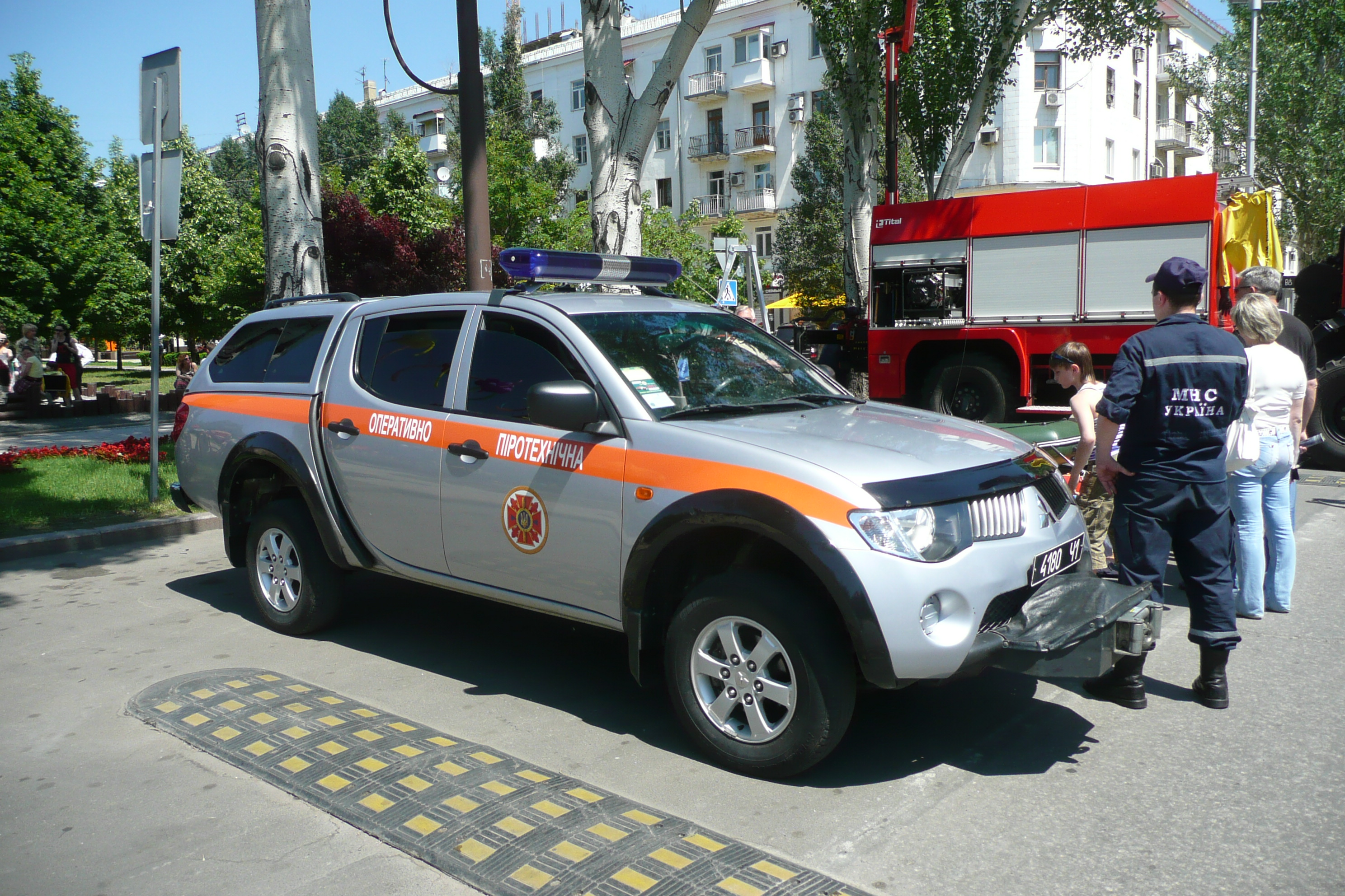 День защиты детей в Донецке